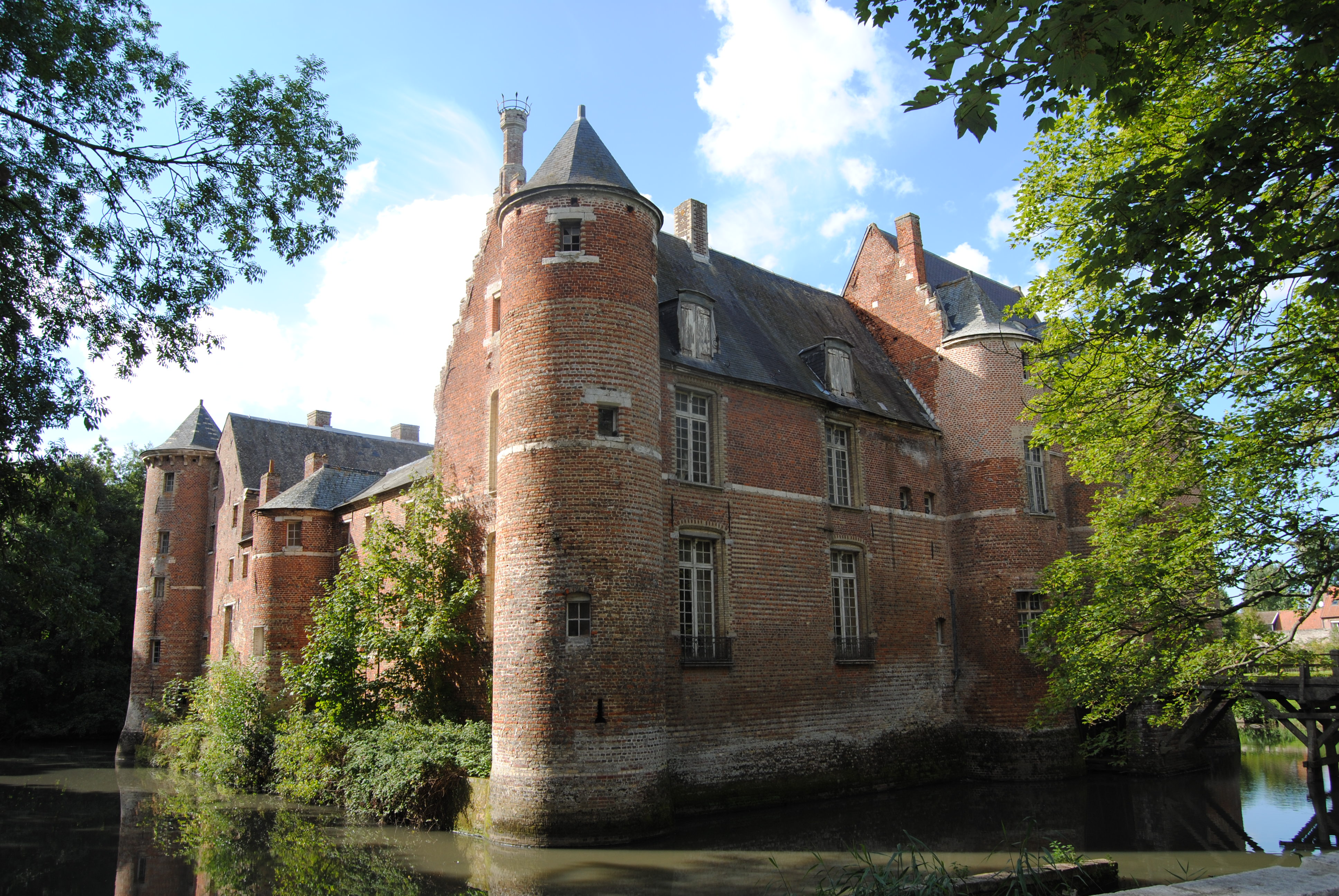 chateau d'esquelbecq